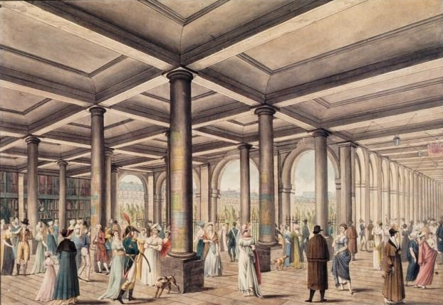 Conversations galantes entre prostituées et clients au Palais Royal dans les galeries de Montpensier et de Beaujolais, Paris, 1800.